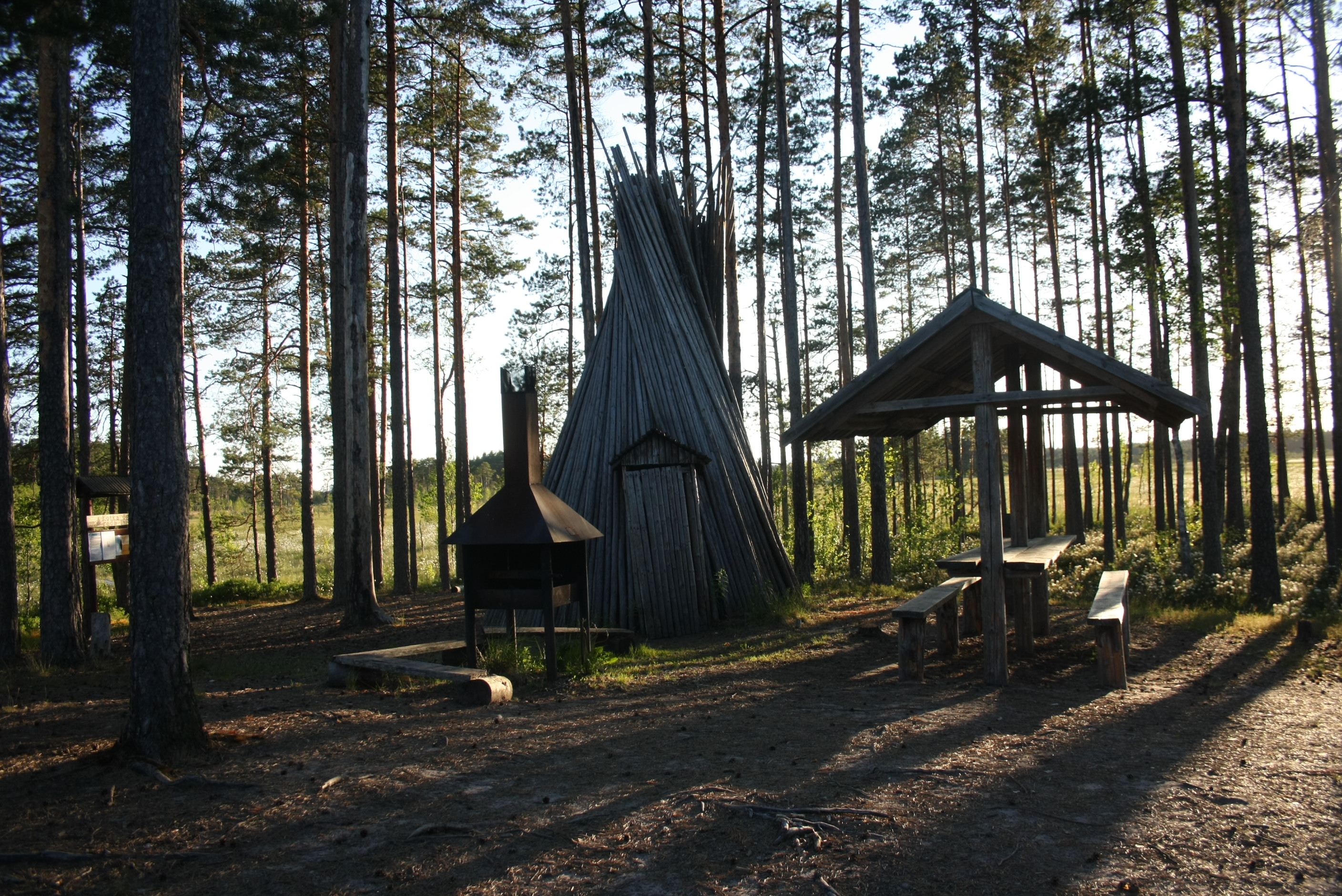 Kotka matkaraja puhkepunkt.